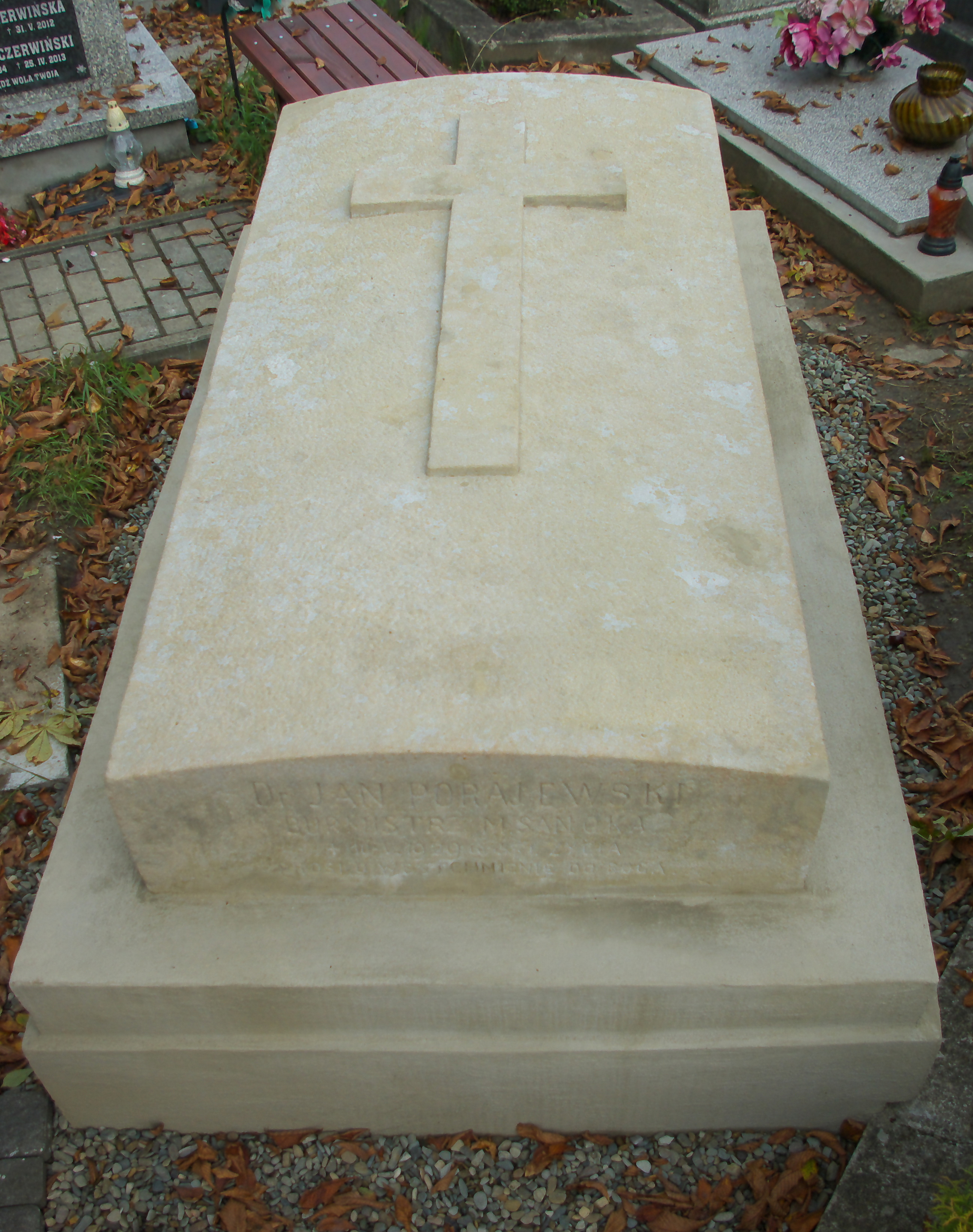 Nagrobek Jana Porajewskiego na Cmentarzu Centralnym w Sanoku, po renowacji dokonanej staraniem Stowarzyszenia Opieki nad Starymi Cmentarzami w Sanoku w 2016 roku.